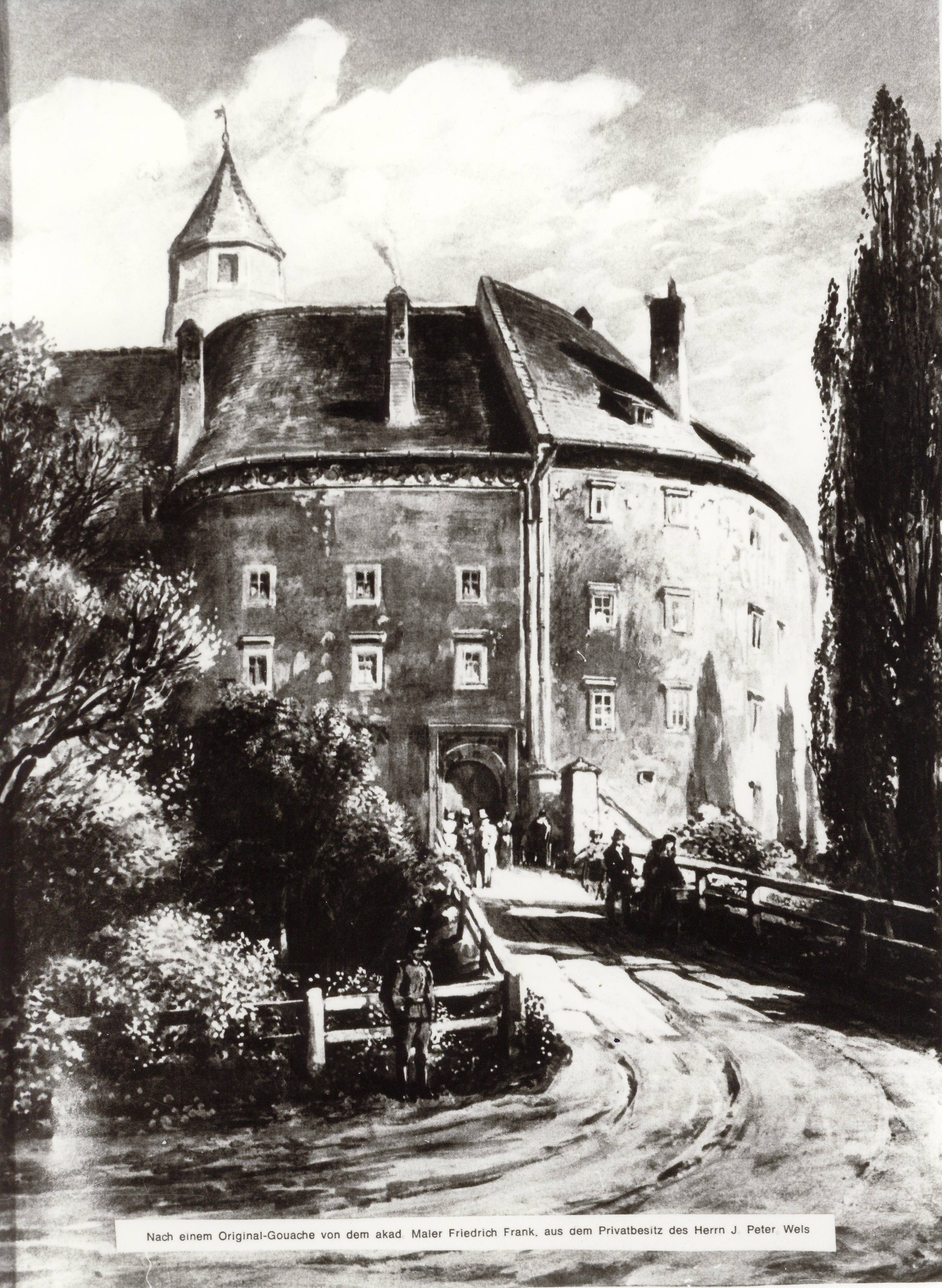 Porträit des Schlosses Polheim zur Polheimer Zeit